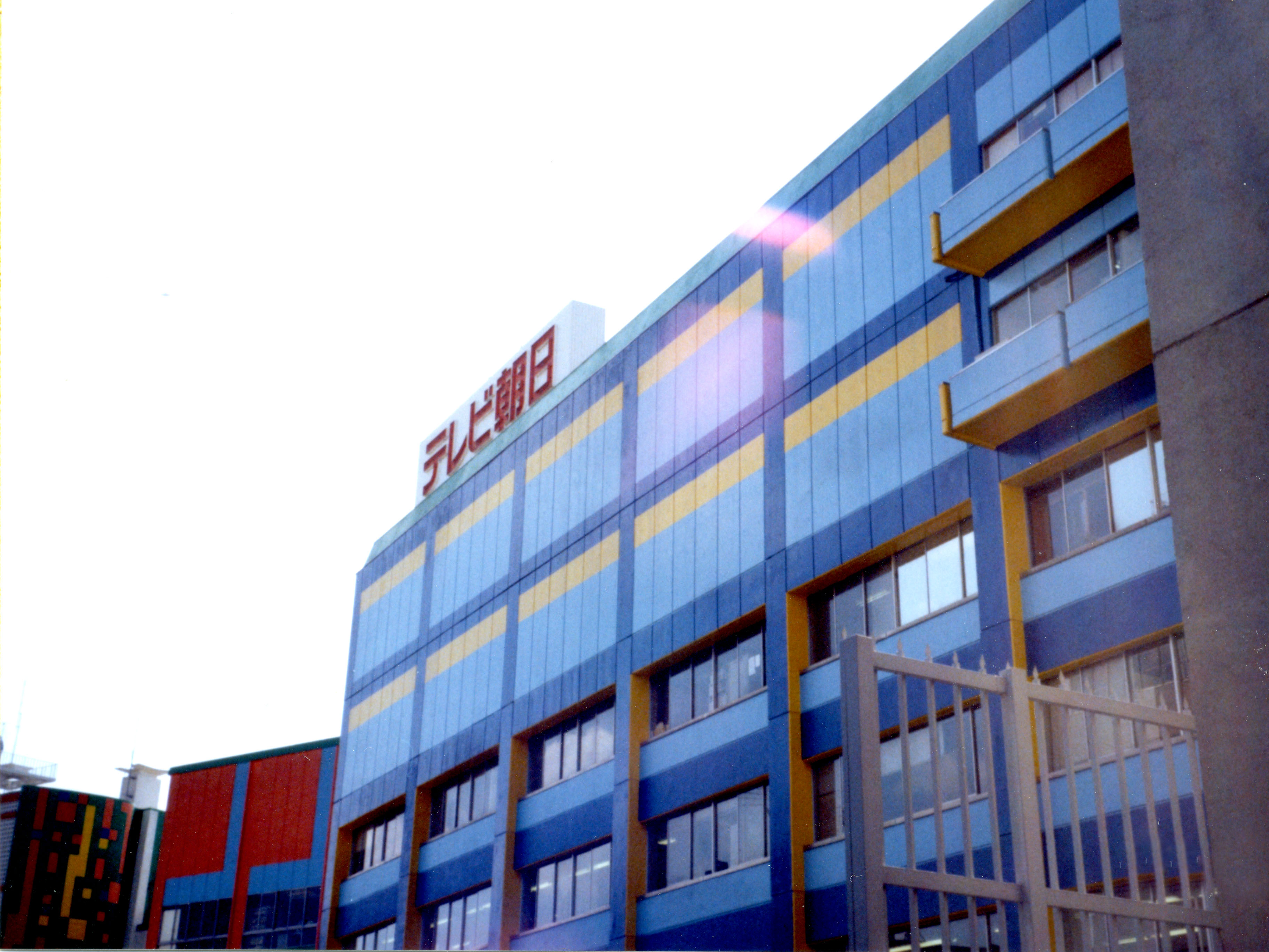 TV Asahi Roppongi Center,Roppongi Minato-ku Tokyo Japan.